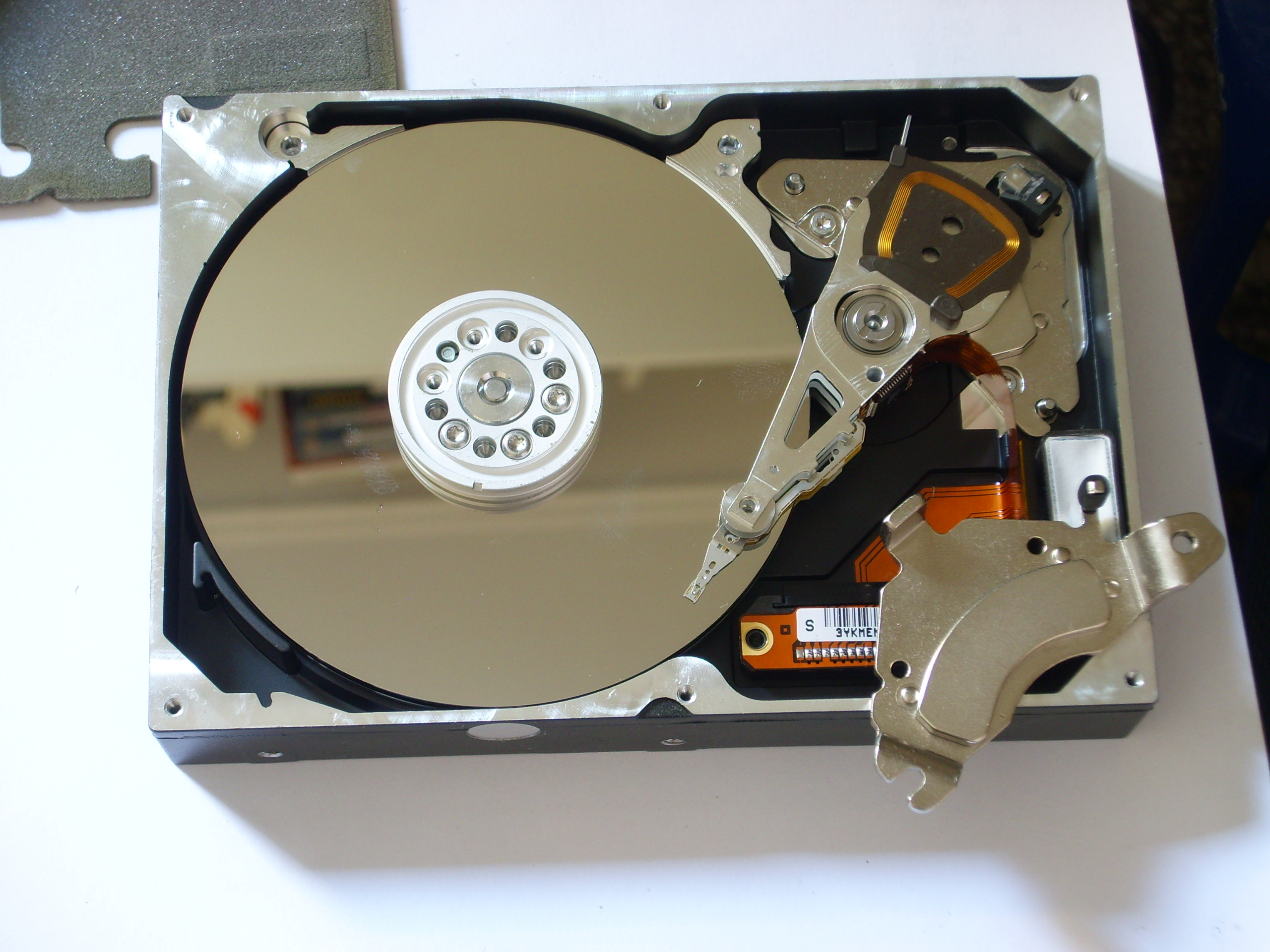 Apertura di un hard disk. Il disco aperto con la prima calamita del sistema di controllo delle testine rimossa.